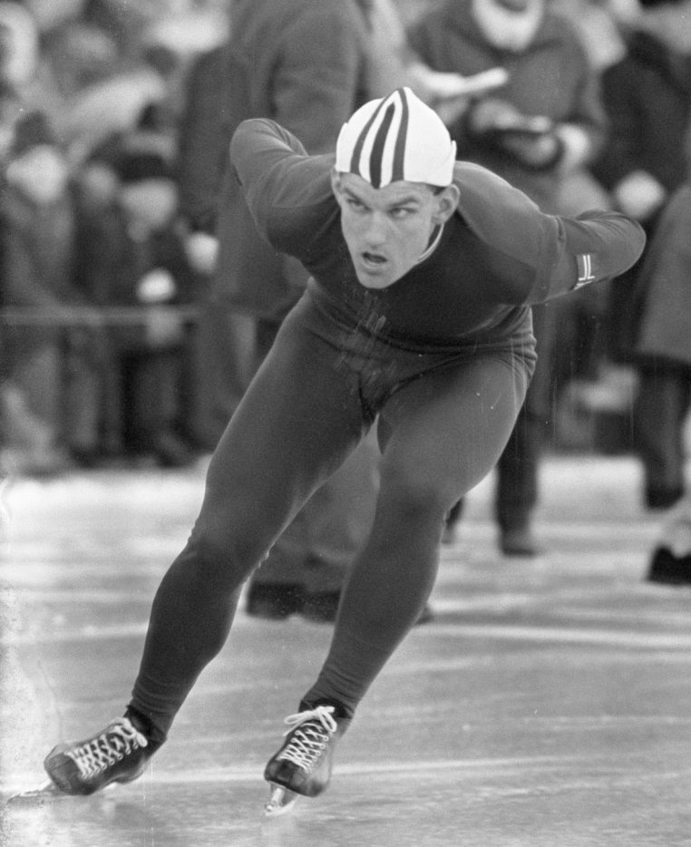 Svein-Erik Stiansen, Europese Schaatskampioenschappen te Oslo 1968